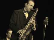 Jan Tříska při koncertě Melody Makers